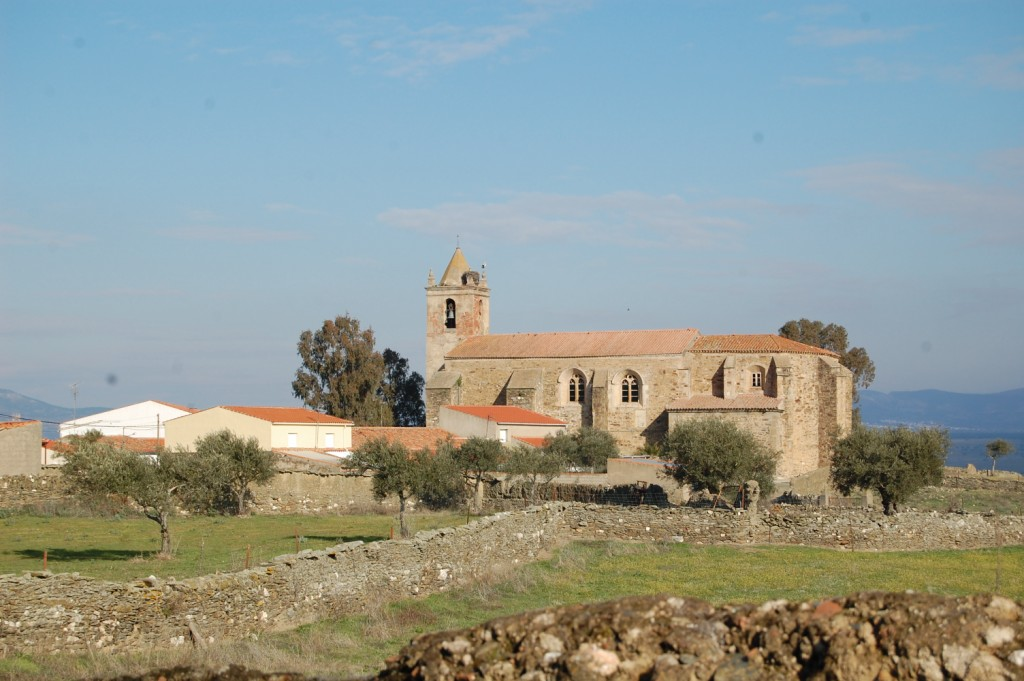 Iglesia de Hinojal, provincia de Cáceres, España